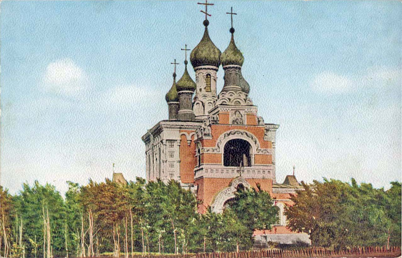 Иверская церковь в Харбине